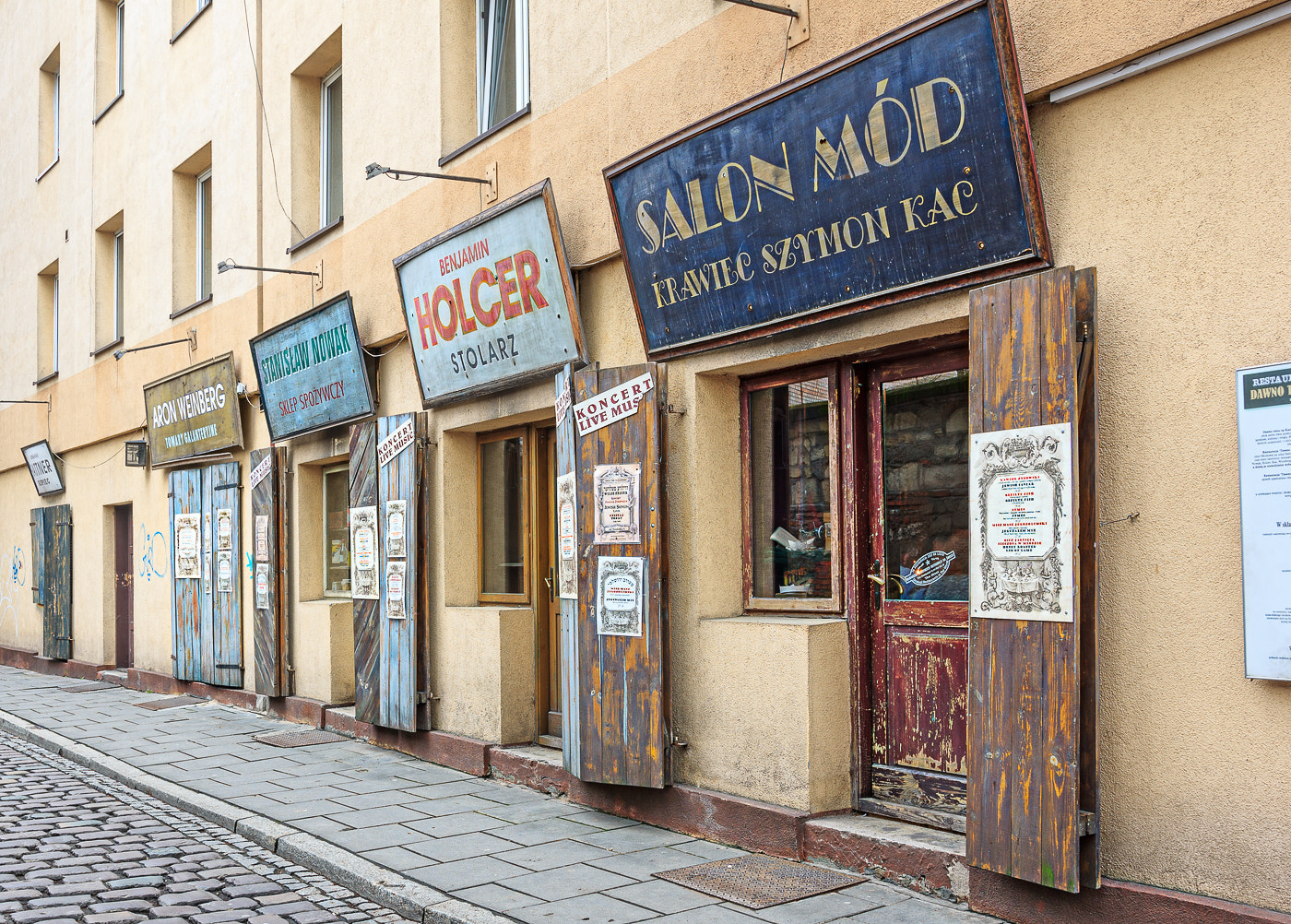 500px provided description: Dzielnica Kazimierz w Krakowie Zdj?cie do wykorzystania komercyjnego i niekomercyjnego. Prosimy o oznaczenie HRS Poland jako autora zdj?cia. Na przyk?ad: ?r?d?o: ?r?d?o: HRS Poland - Krak?w Please tag HRS Poland as a source. For example: Source: HRS Poland - Cracow [#city ,#poland ,#old town ,#krakow ,#polska ,#cracow ,#kazimierz ,#dzielnica]